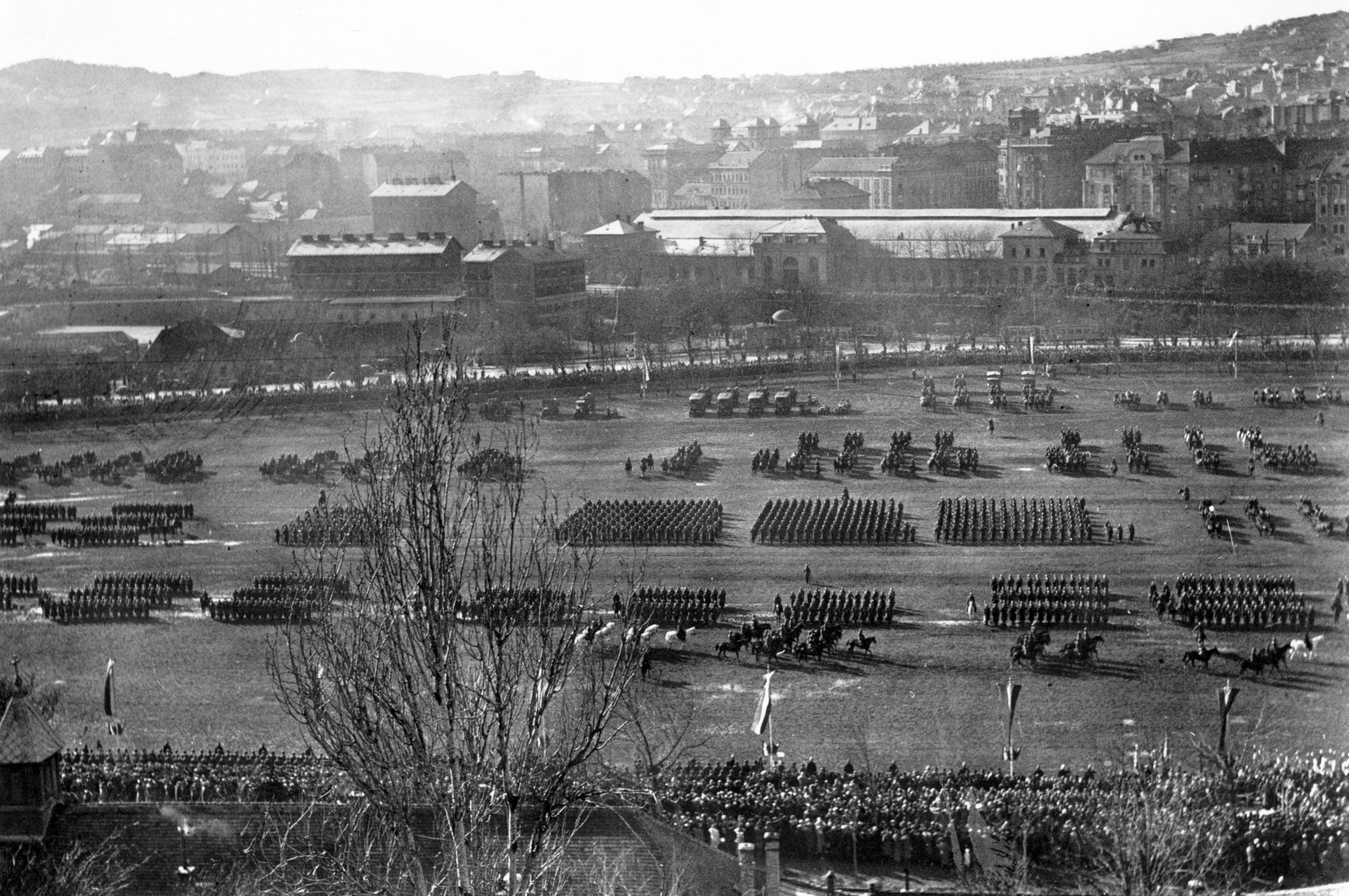 Vérmező, díszszemle a budai Várból nézve, háttérben középen a Déli pályaudvar. Horthy Miklós 15 éves kormányzói jubileuma alkalmából tartott ünnepség. Location: Hungary, Budapest I. Tags: parade, military, rider, Budapest Title: Vérmező, díszszemle a budai Várból nézve, háttérben középen a Déli pályaudvar. Horthy Miklós 15 éves kormányzói jubileuma alkalmából tartott ünnepség.